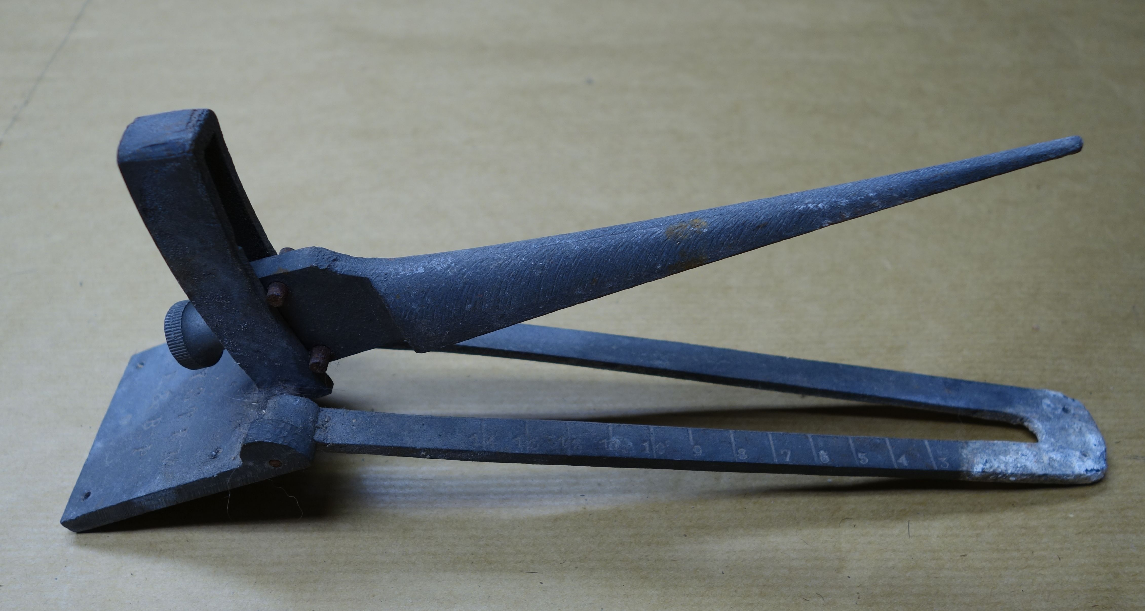 Kürschner-Handwerkszeug: Metall-Fellkeil zum rationellen Einarbeiten von Überschneidungen beim Zwecken (Spannen) von Pelzen. Die Keilgröße ist auswechselbar. System H. & B. P. Gesehen in der Werkstatt des Kürschnermeisters Fritz Schwörer, Emmendingen.